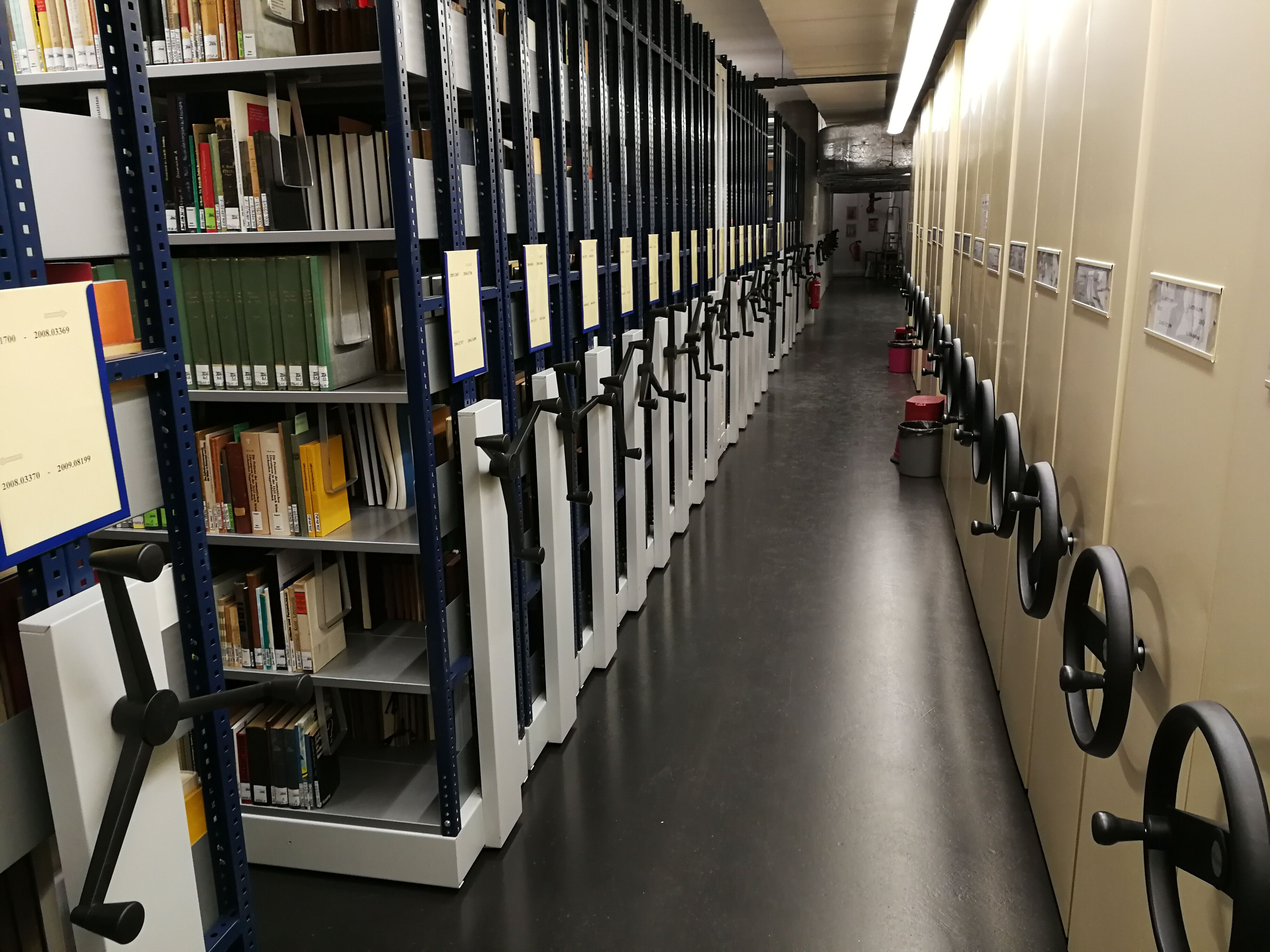 Blick in das Magazin der Universitätsbibliothek Magdeburg